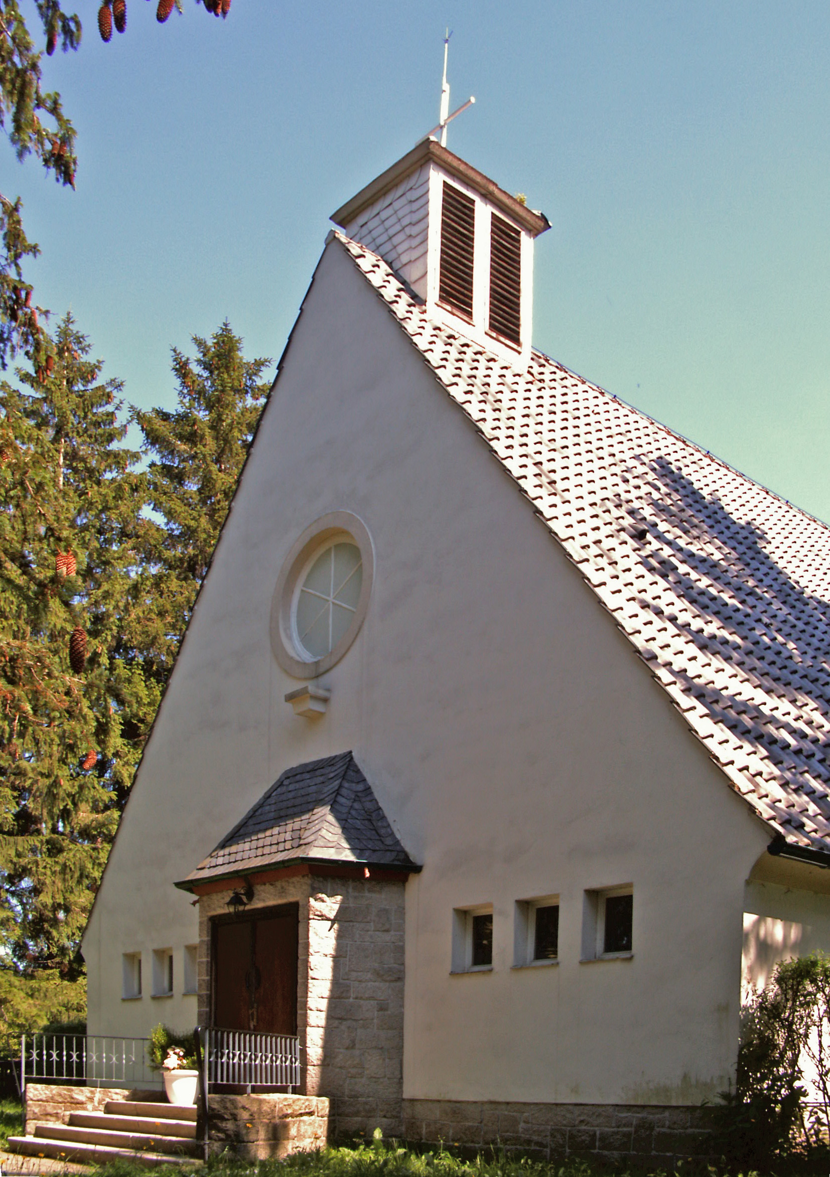 Katholische Kirche St. Benedikt in Ilsenburg, Landkreis Harz